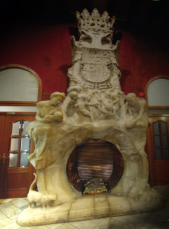 Hotel Espanya, obra modernista de Lluís Domènech i Montaner. Llar de foc del bar de l'hotel obra de Eusebi Arnau.